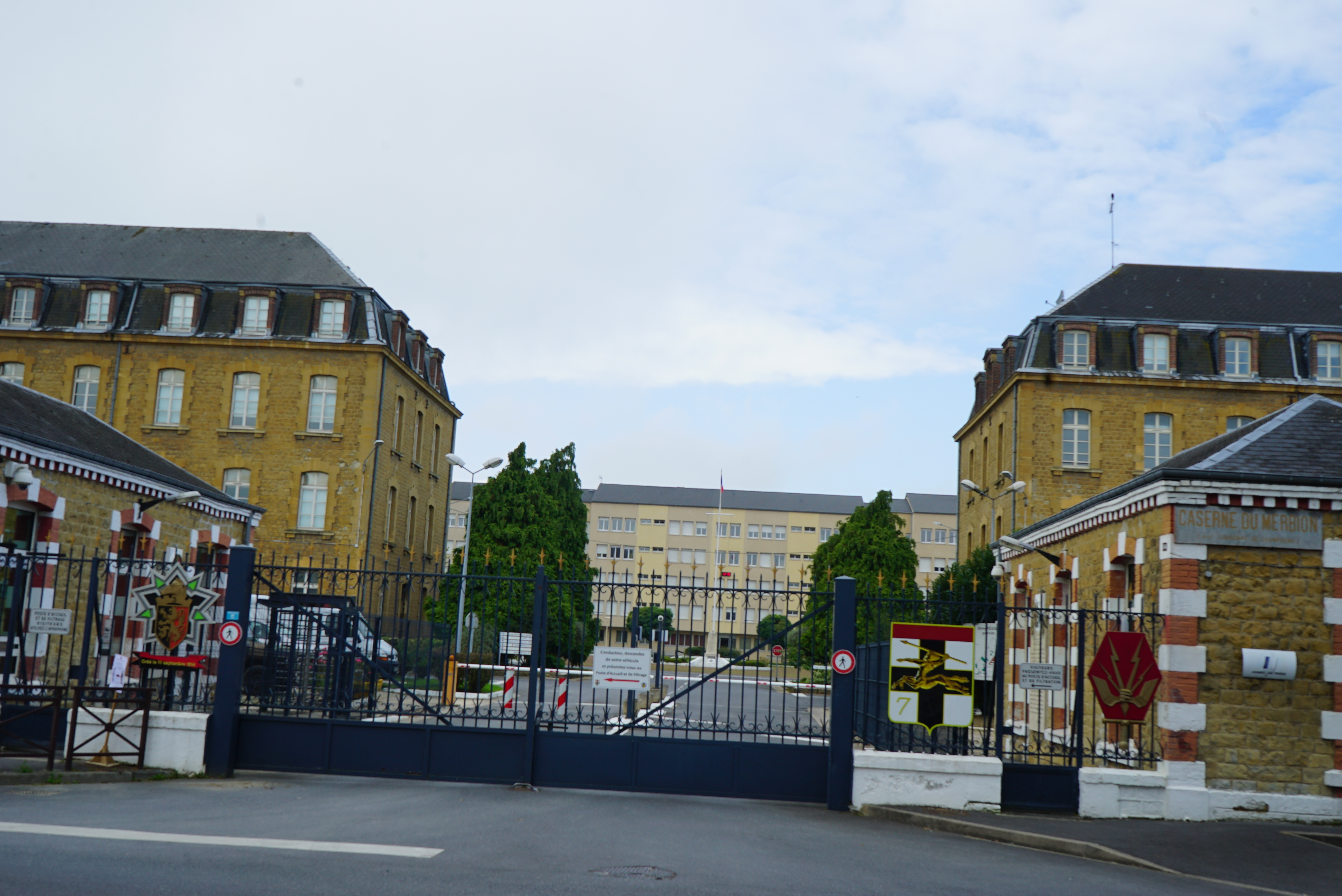 En septembre 2017.